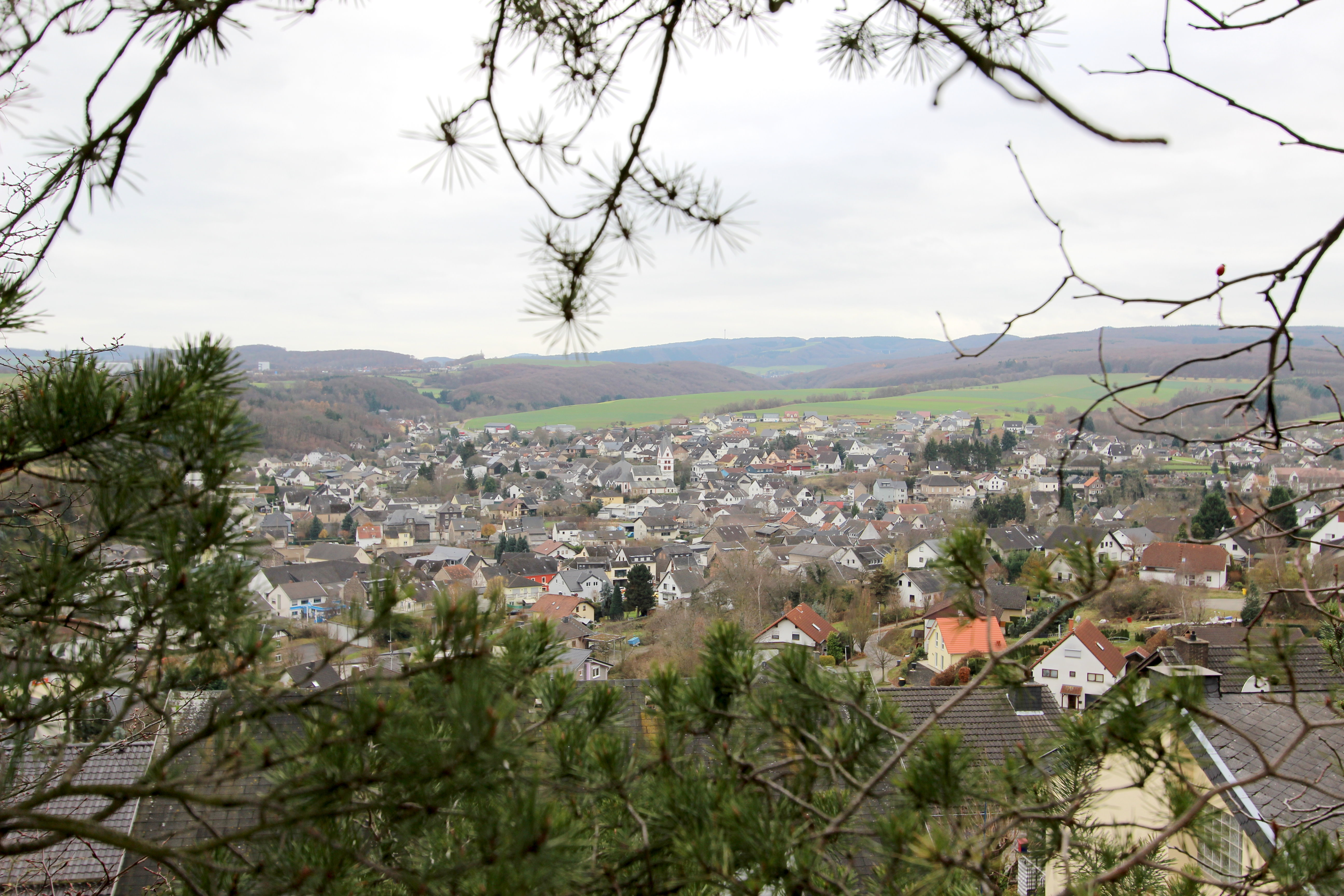 56651 Niederzissen. Panoramablick über Niederzissen vom Bausenberg fotografiert. Aufnahme von 2017.